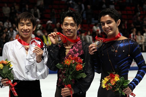 Nobunari Oda (2), Daisuke Takahashi (1), Armin Mahbanoozadeh (3) at the 2010 Skate America